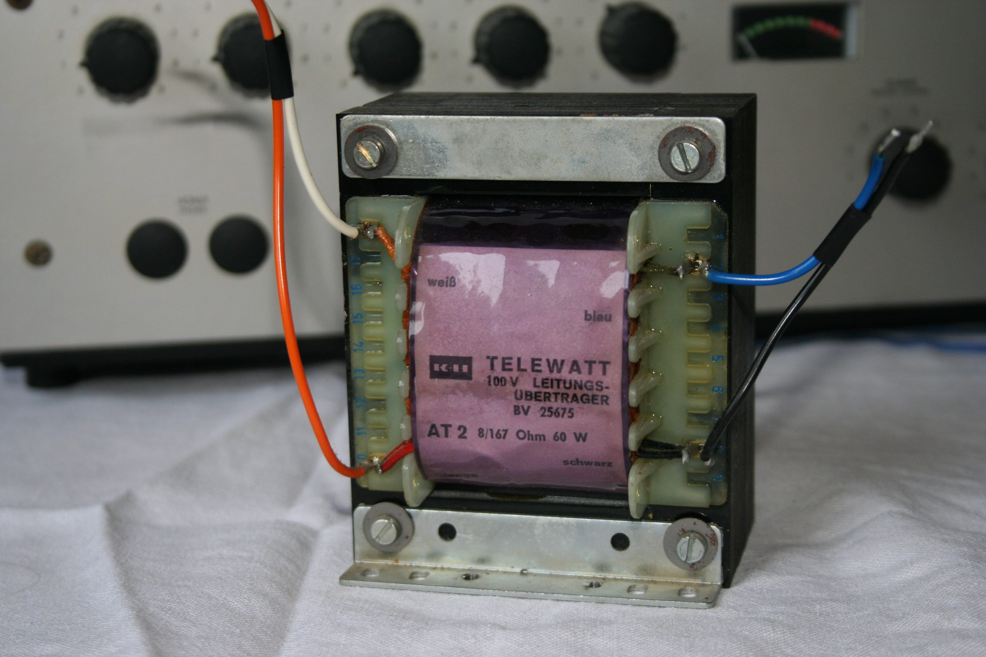 Leistungsübertrager von Klein+Hummel (60W/100V) aus einem Telewatt E60